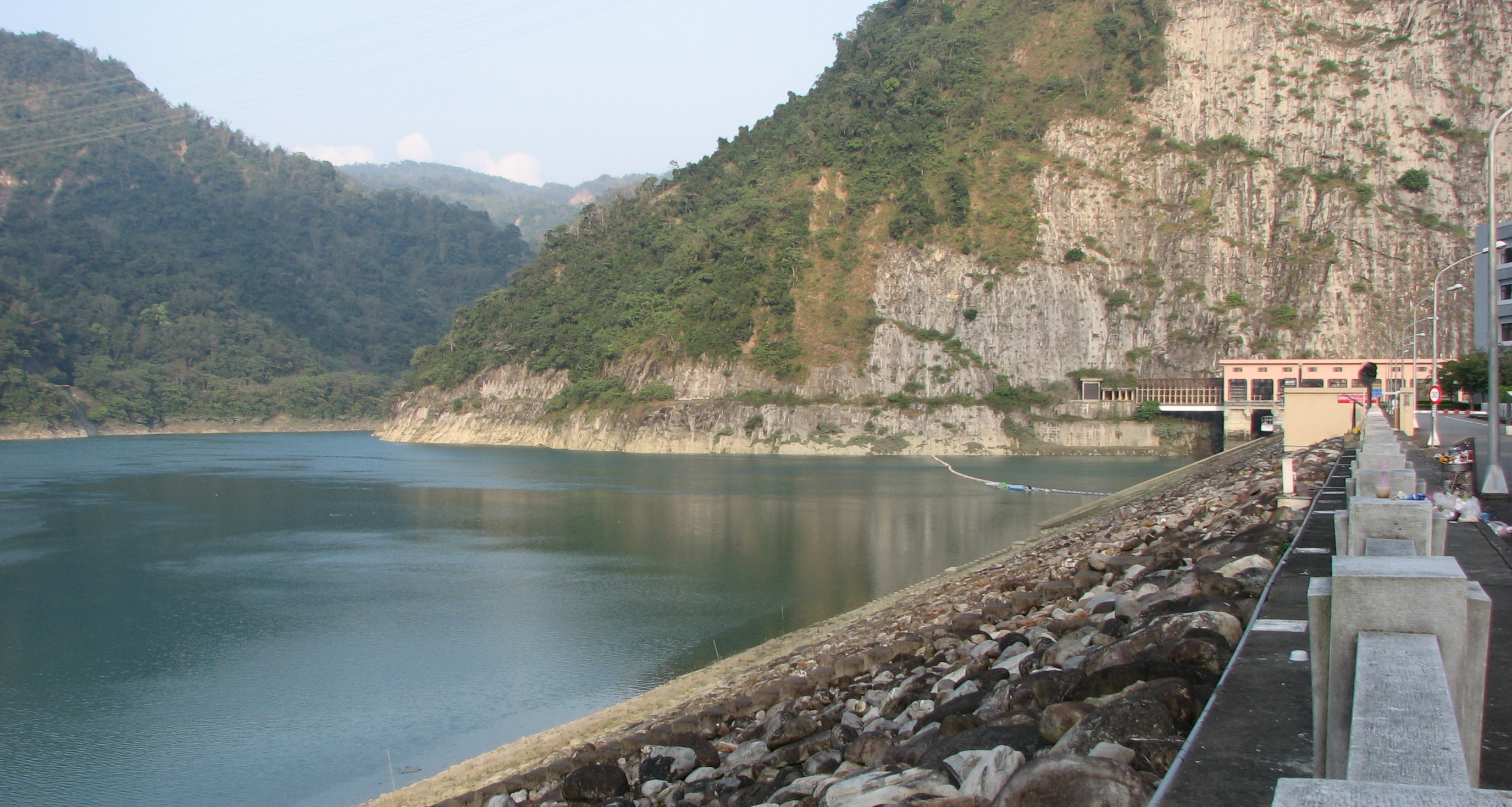 位於南投縣水里鄉的台電明潭抽蓄水力發電廠（明潭水庫）